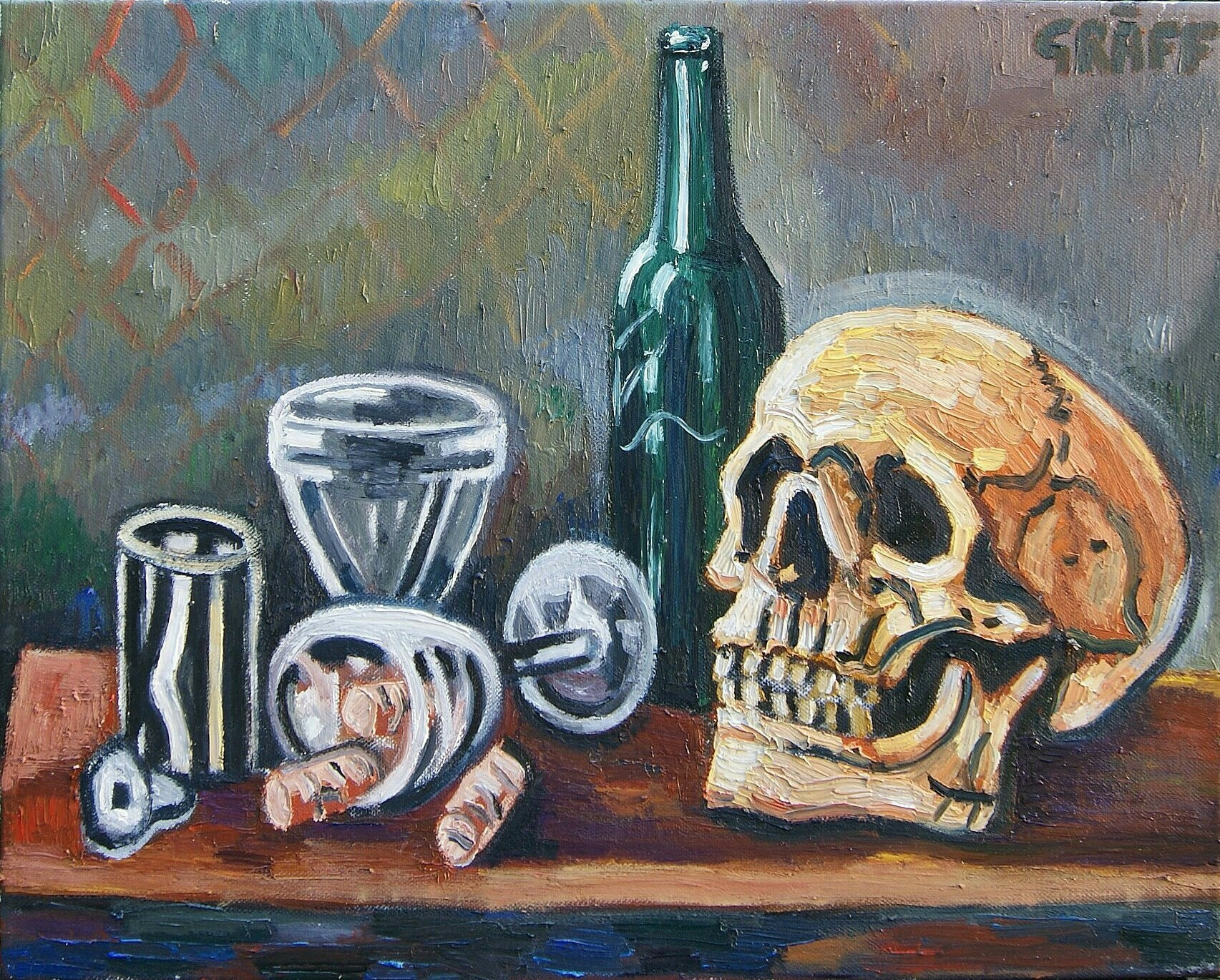 Matthias Laurenz Gräff, "Memento mori", Öl auf Leinwand, 40x50 cm, 2017